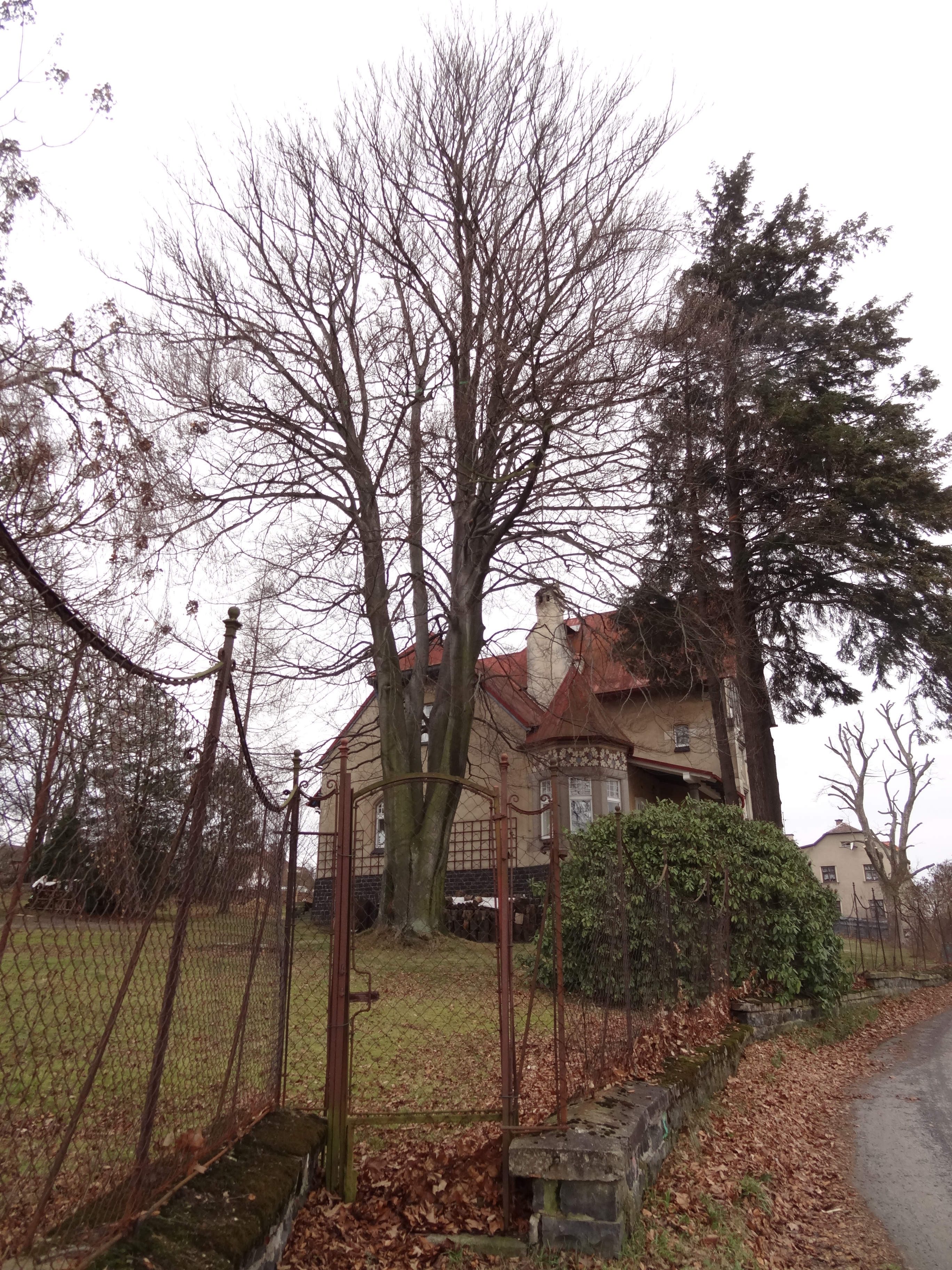 Raspenava - památný buk lesní Na Kopečku u někdejší vily malíře W. F. Jägera čp. 585